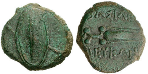 Дихалк